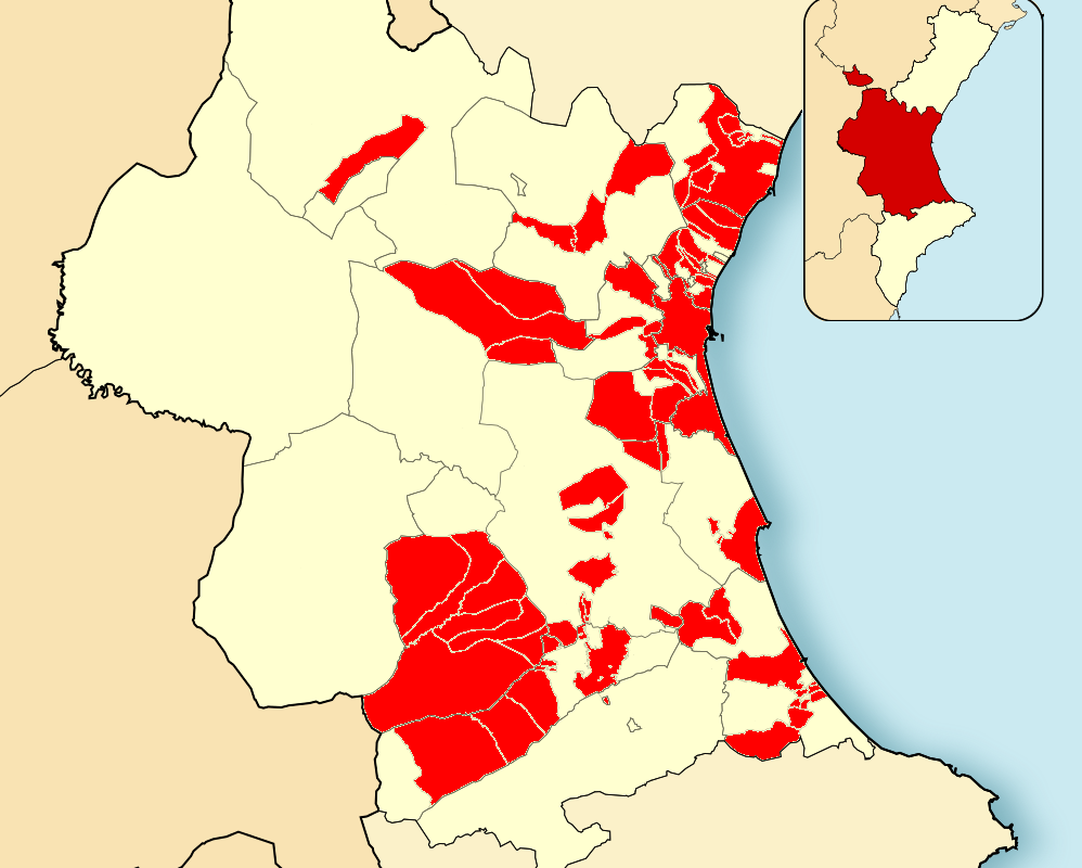 Municipios adheridos al Cantón Federal Valenciano (1873).